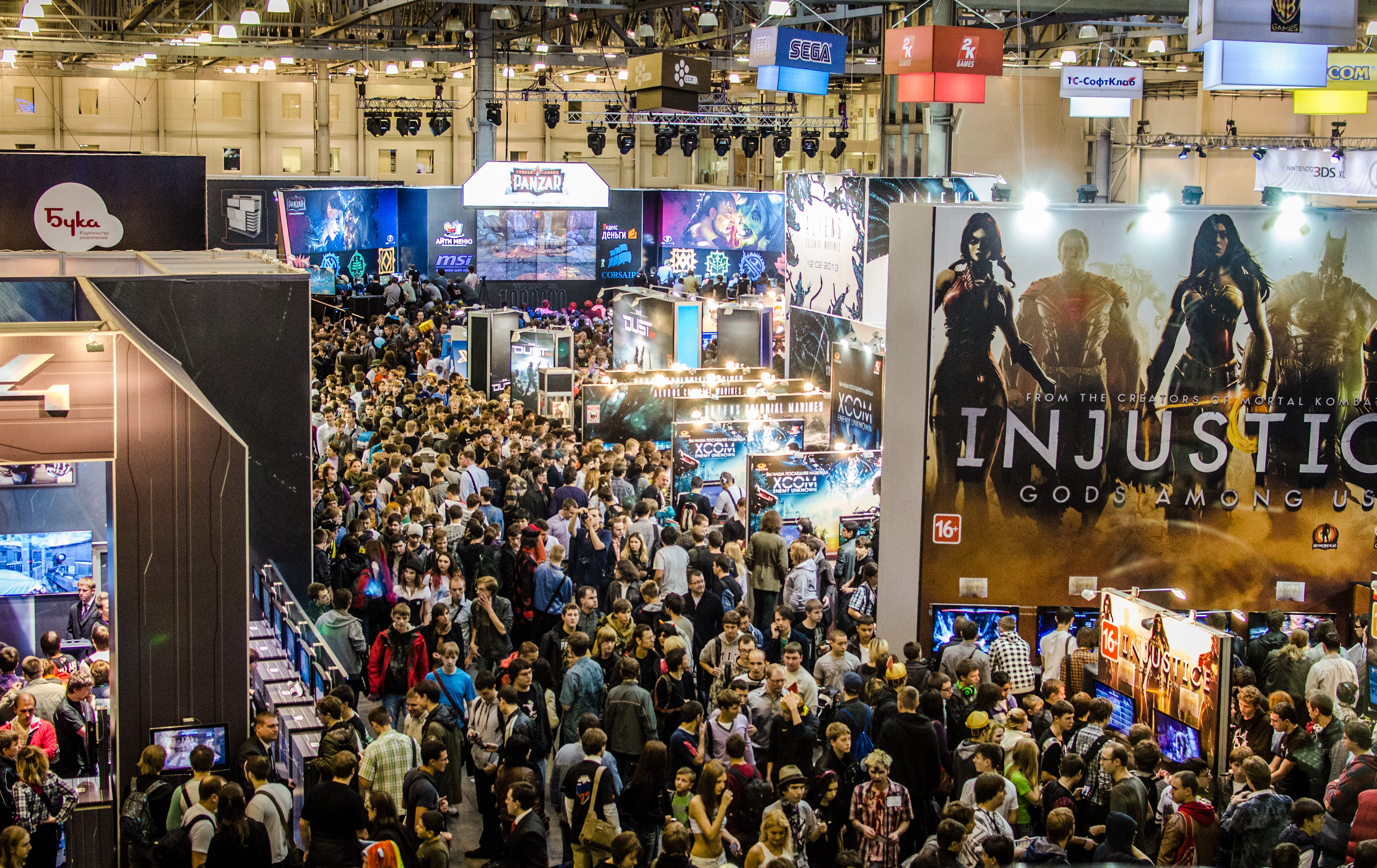 Igromir 2012